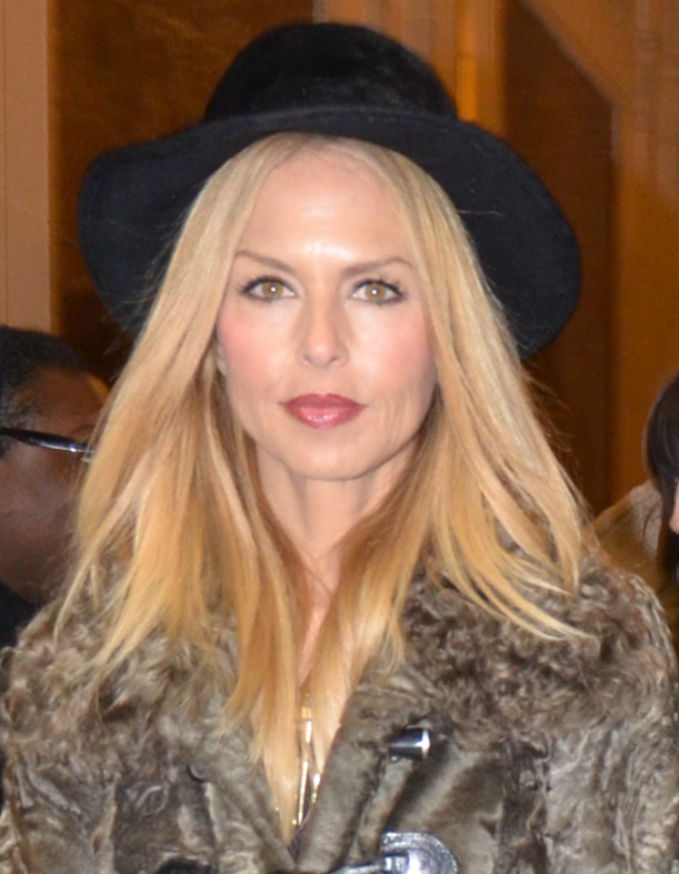 Rachel Zoe and Rodger Berman After Oscar de la Renta